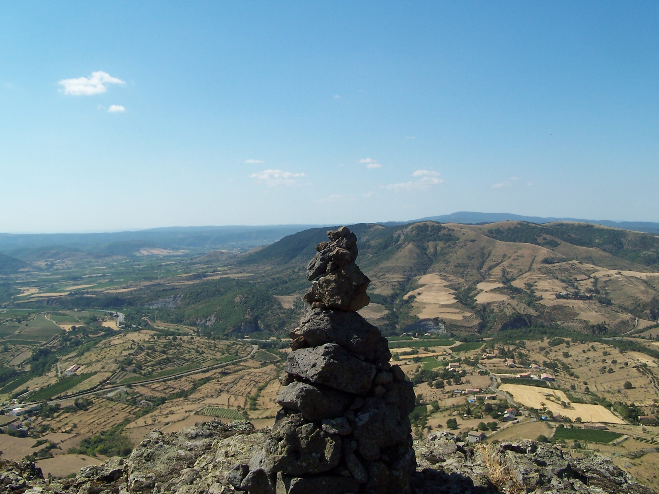 Vue vers le sud au dessus de Saint-Pons (Ardèche), depuis la plaine du Regard.